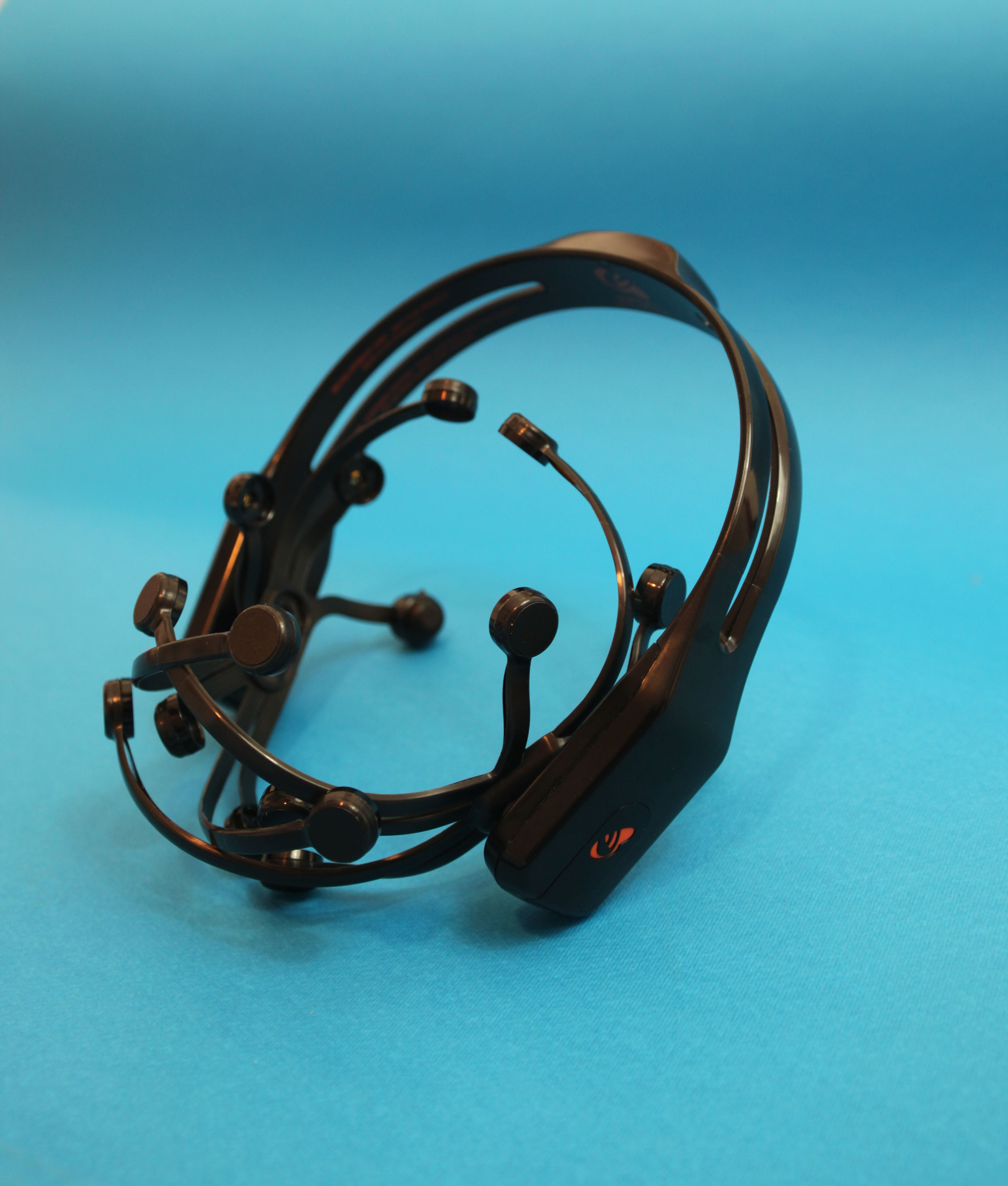 Imagen de un dispositivo de deteccion de ondas cerebrales emotiv